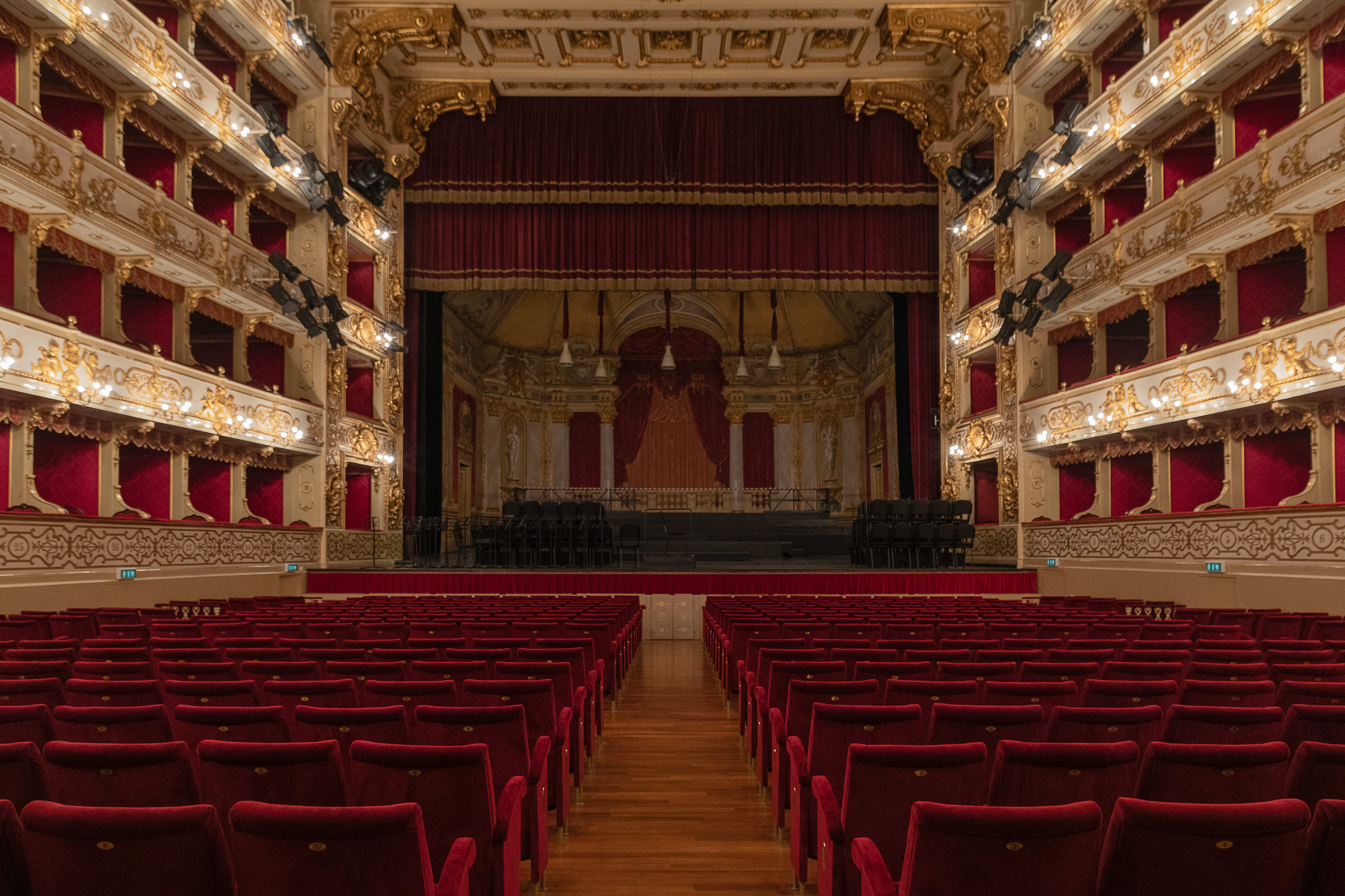 Teatro Regio This is a photo of a monument which is part of cultural heritage of Italy.